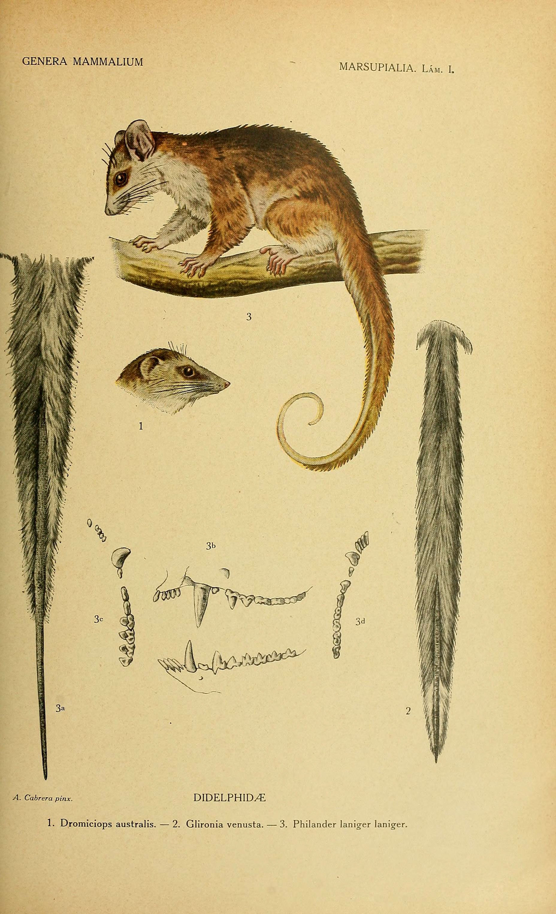 GENERA MAMMALIUM MARSUPIALIA. Lám. I. A. Cabrera pinx. DIDELPHID/E 1. Dromiciops australis. — 2. Glironia venusta. — 3. Philander laniger laniger.